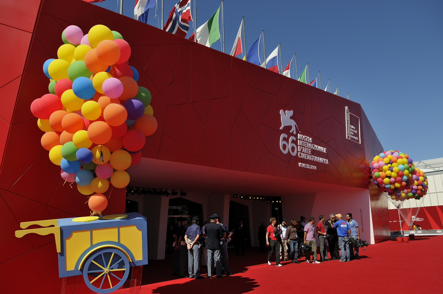 Palais de 66ème Festival du Cinéma de Venise (Mostra), 5ème jour (06/09/2009)